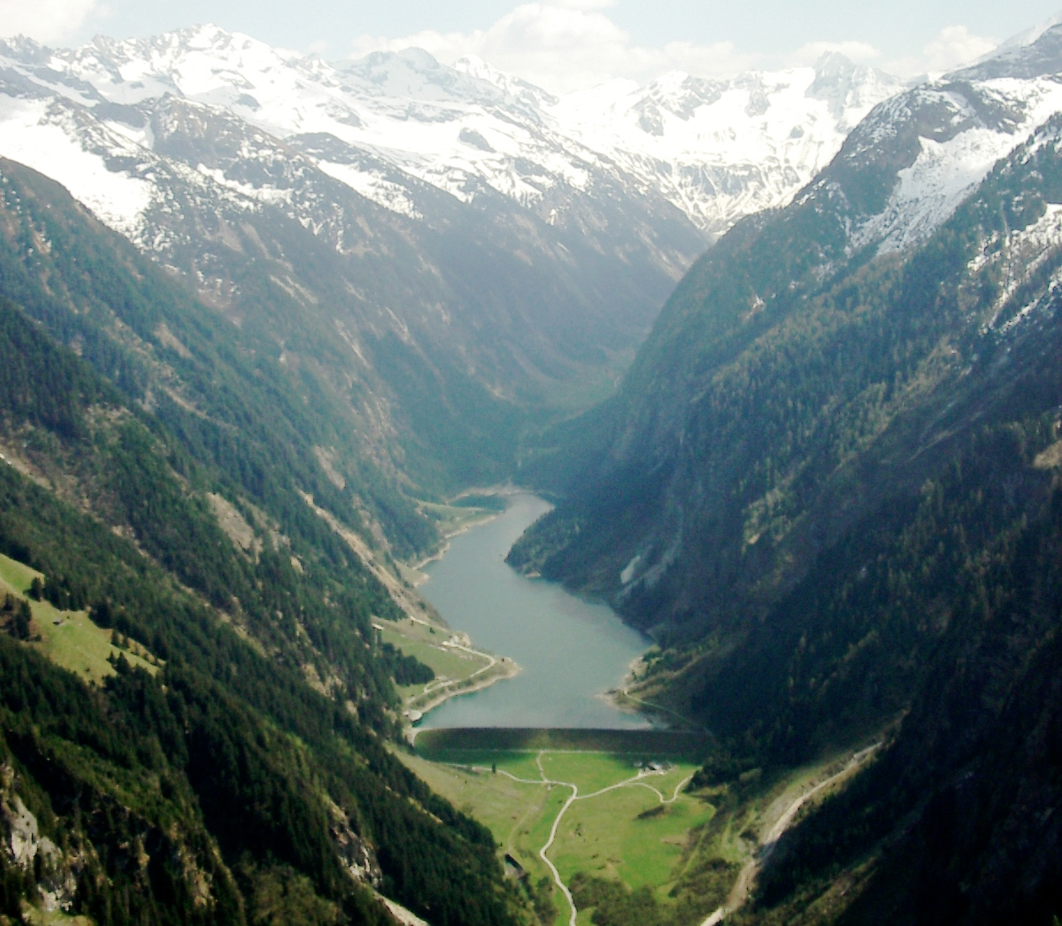 Stillup-Sperre im Zillertal Fotografiert beim Gleitschirmfliegen